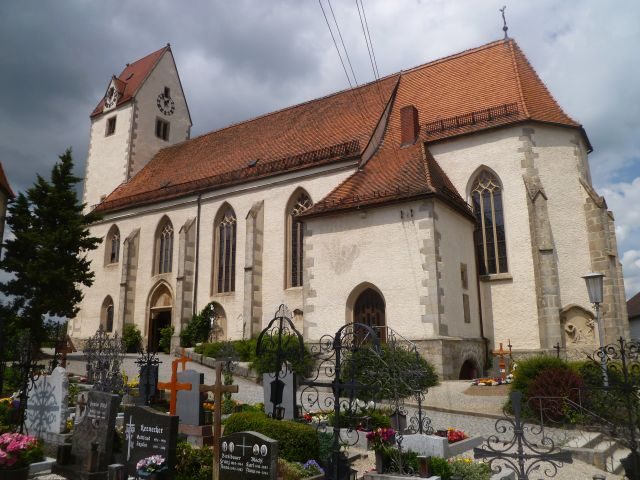 Kath. Pfarrkirche Mariä Himmelfahrt